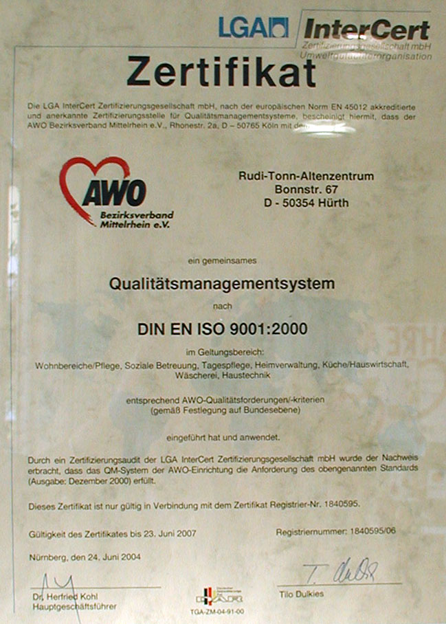 Hürth, Rudi-Tonn-AWO, Zertifikat